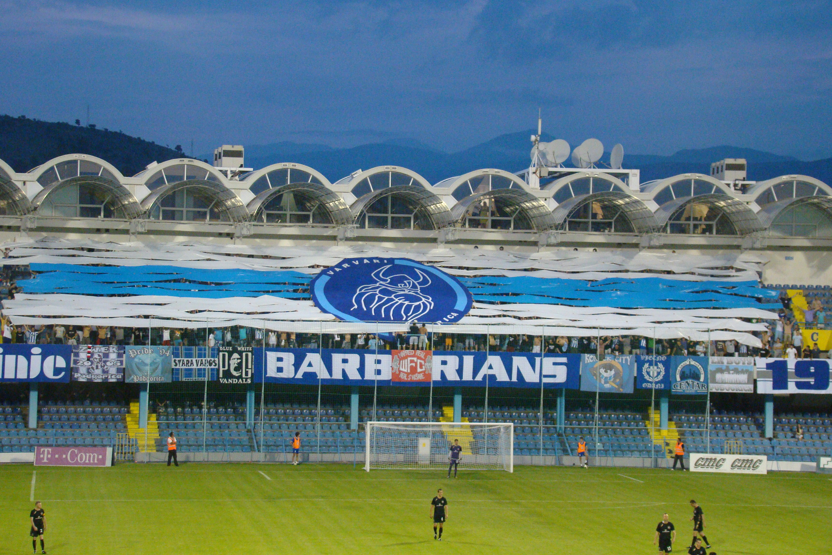 prezentacja kibice Budućnost podczas meczu z Polonią Warszawa